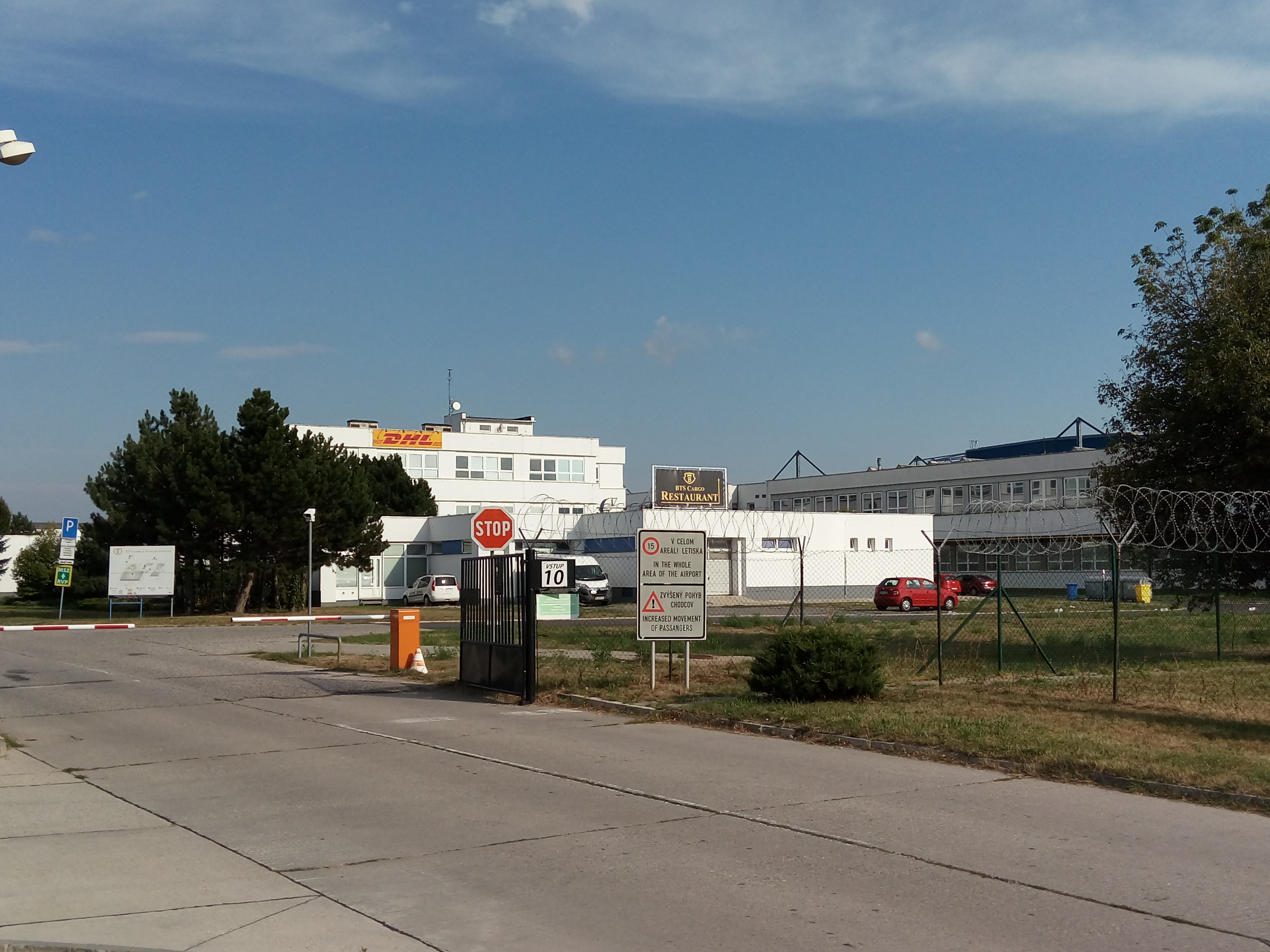 Ivanská cesta, Ružinov, Bratislava